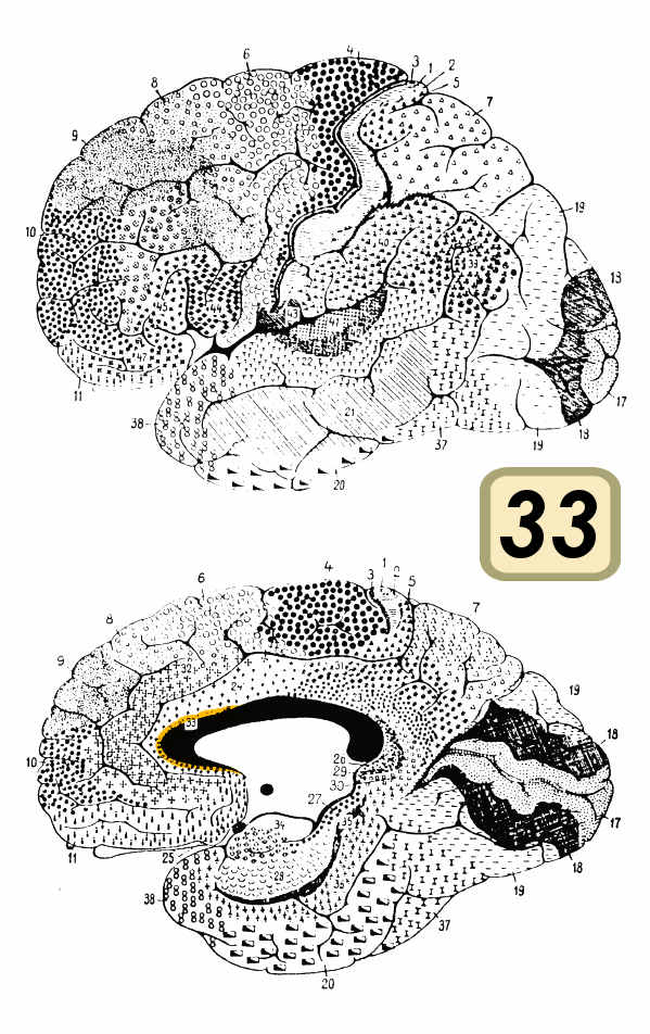 Brodmann area 33.